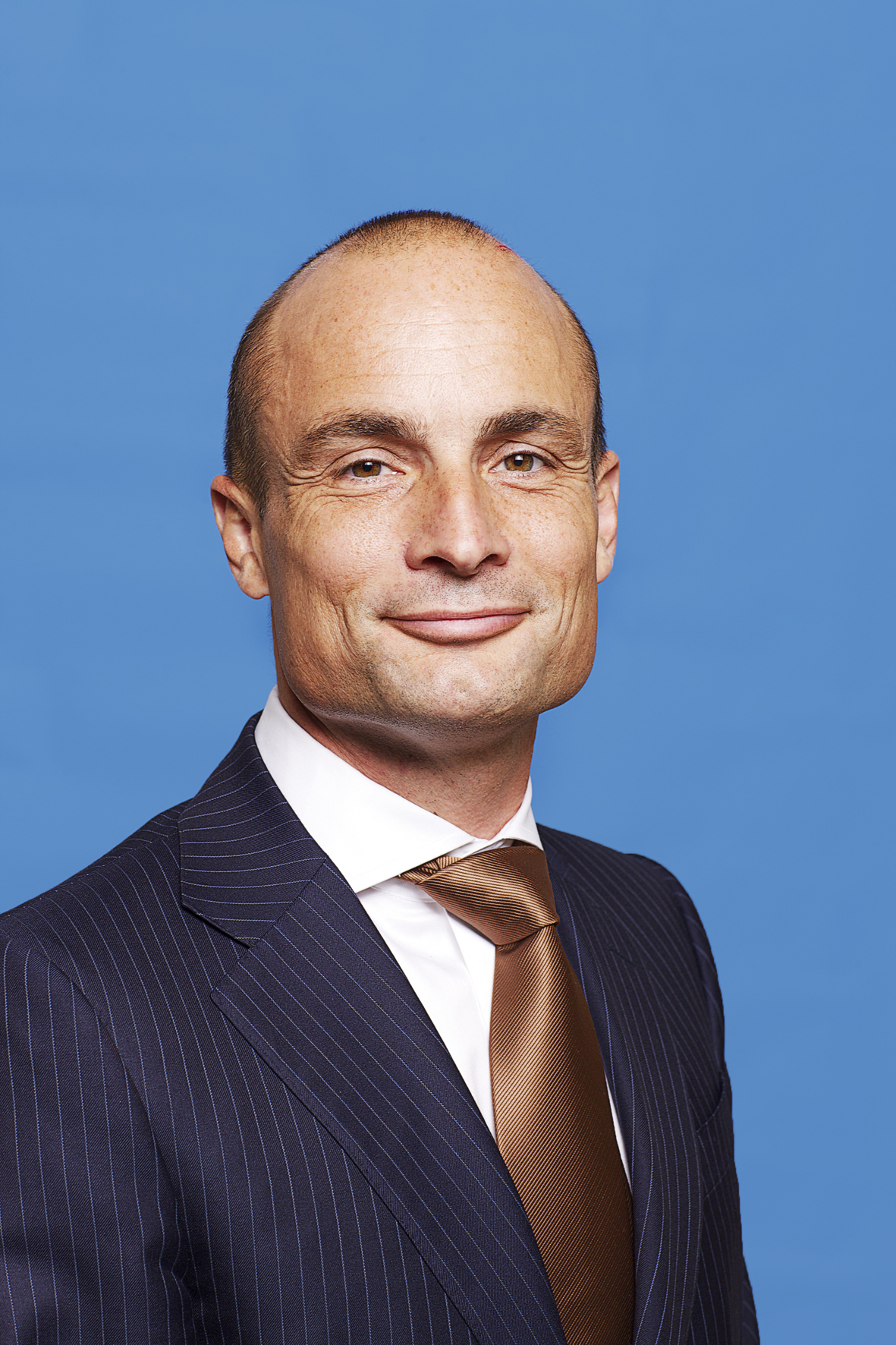 Jan Vos, Kandidaat-Kamerlid. Foto: Lex Draijer.